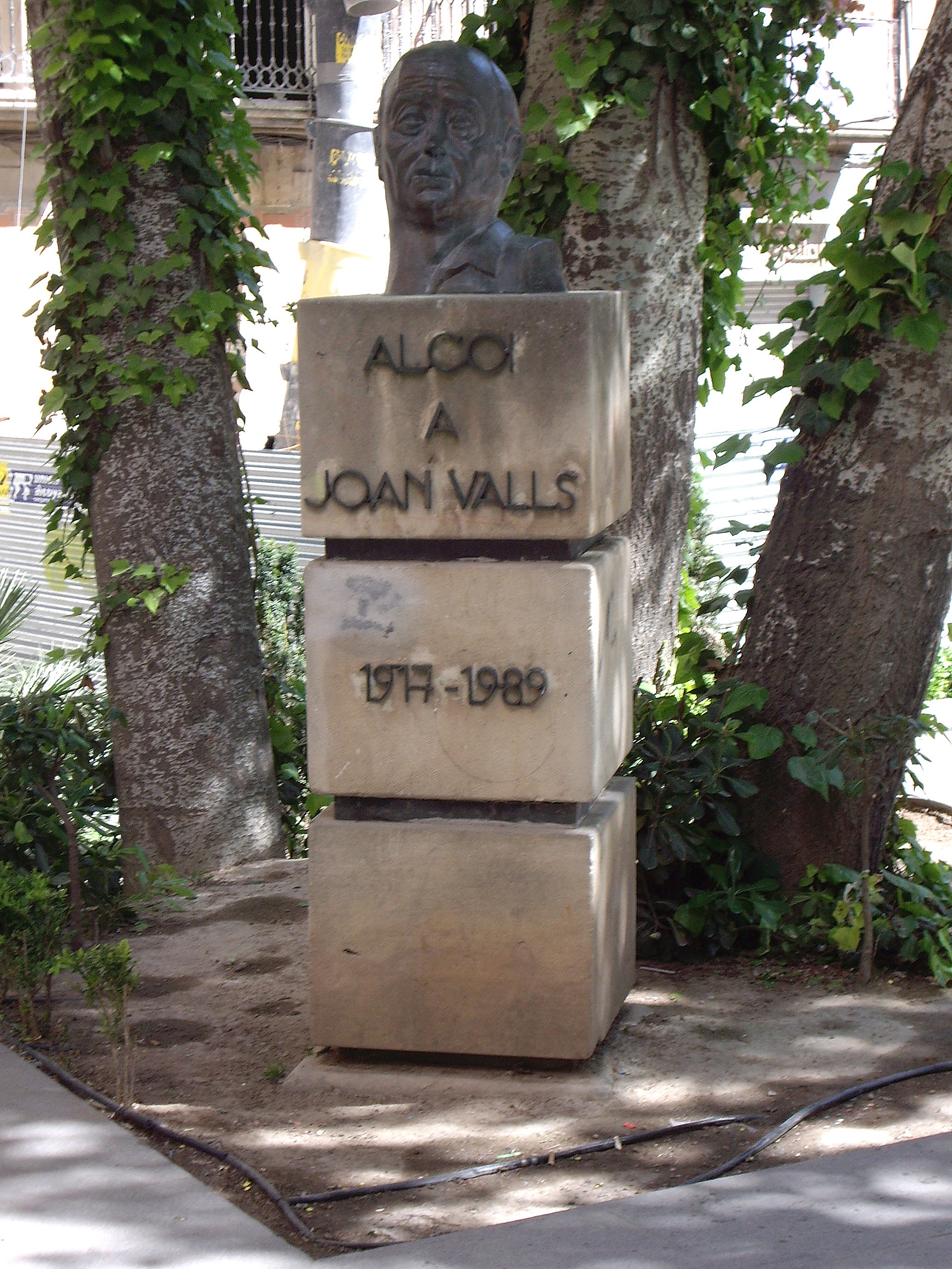 Monument a Joan Valls de Belda(Alcoi)